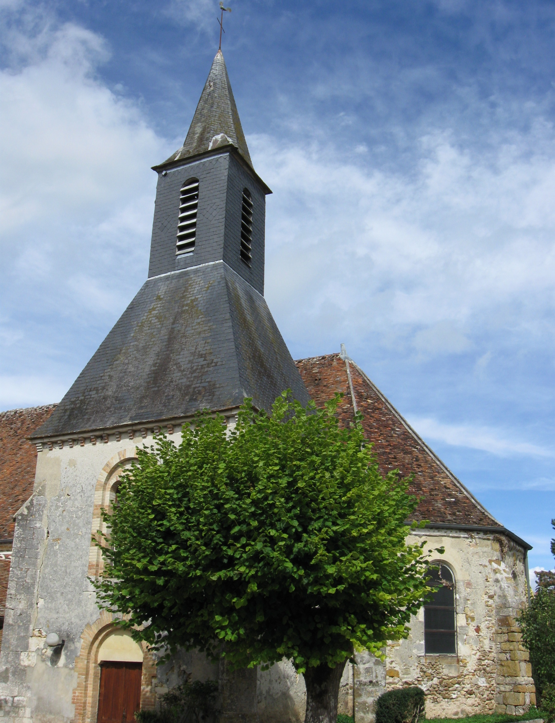 Église Notre-Dame-de-l’Assomption de Coutençon. (Seine-et-Marne, région Île-de-France).